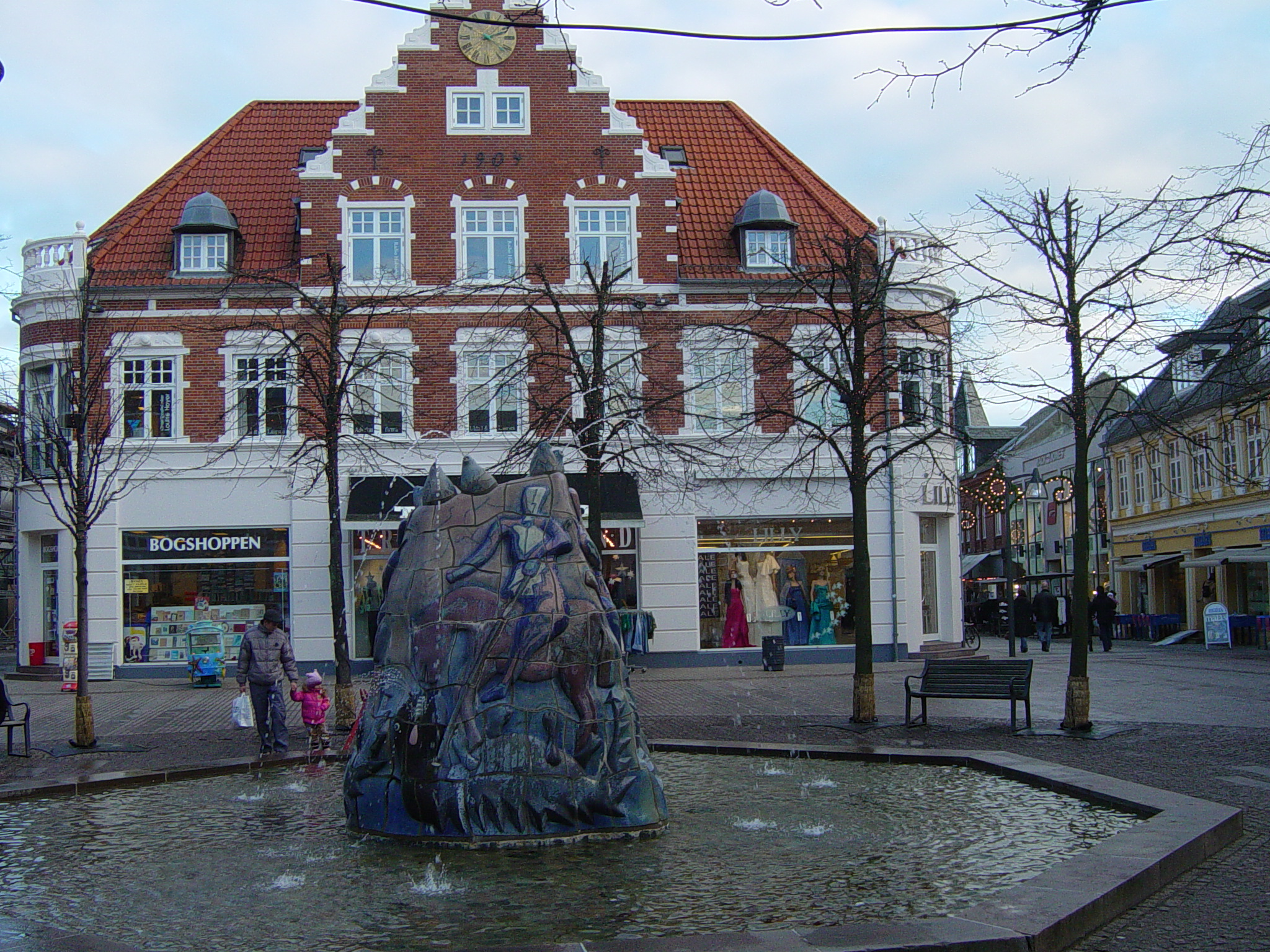 Store Torv, Holsterbo